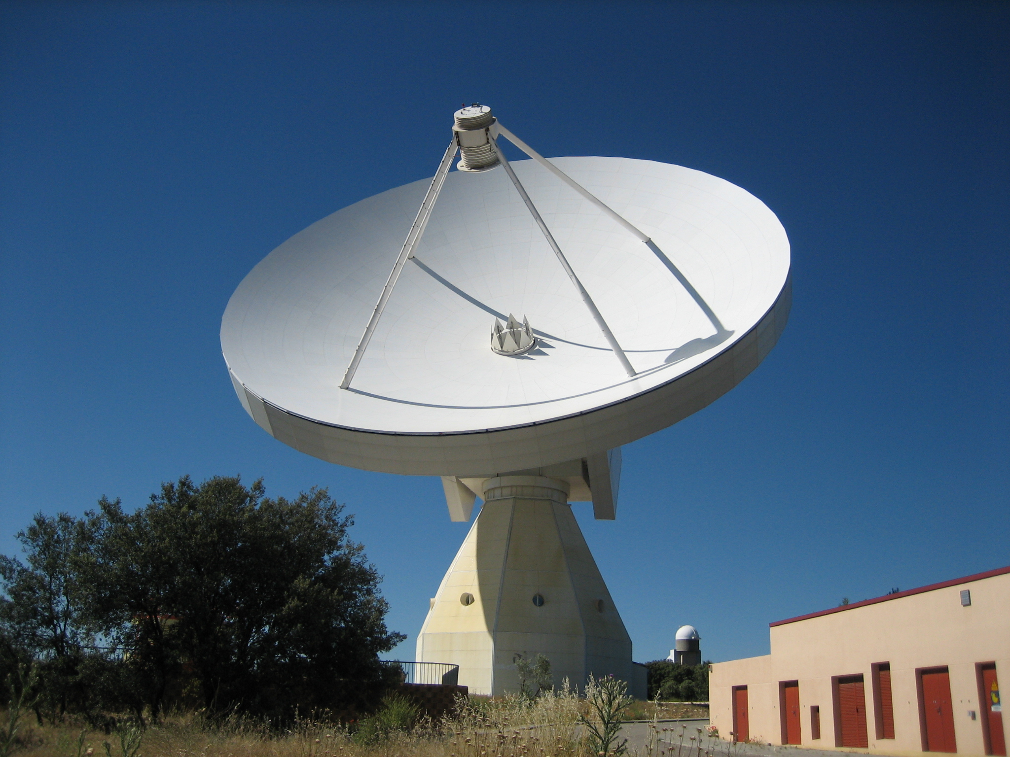 Antena Aries en el centro astronómico de Yebes (Guadalajara, España).